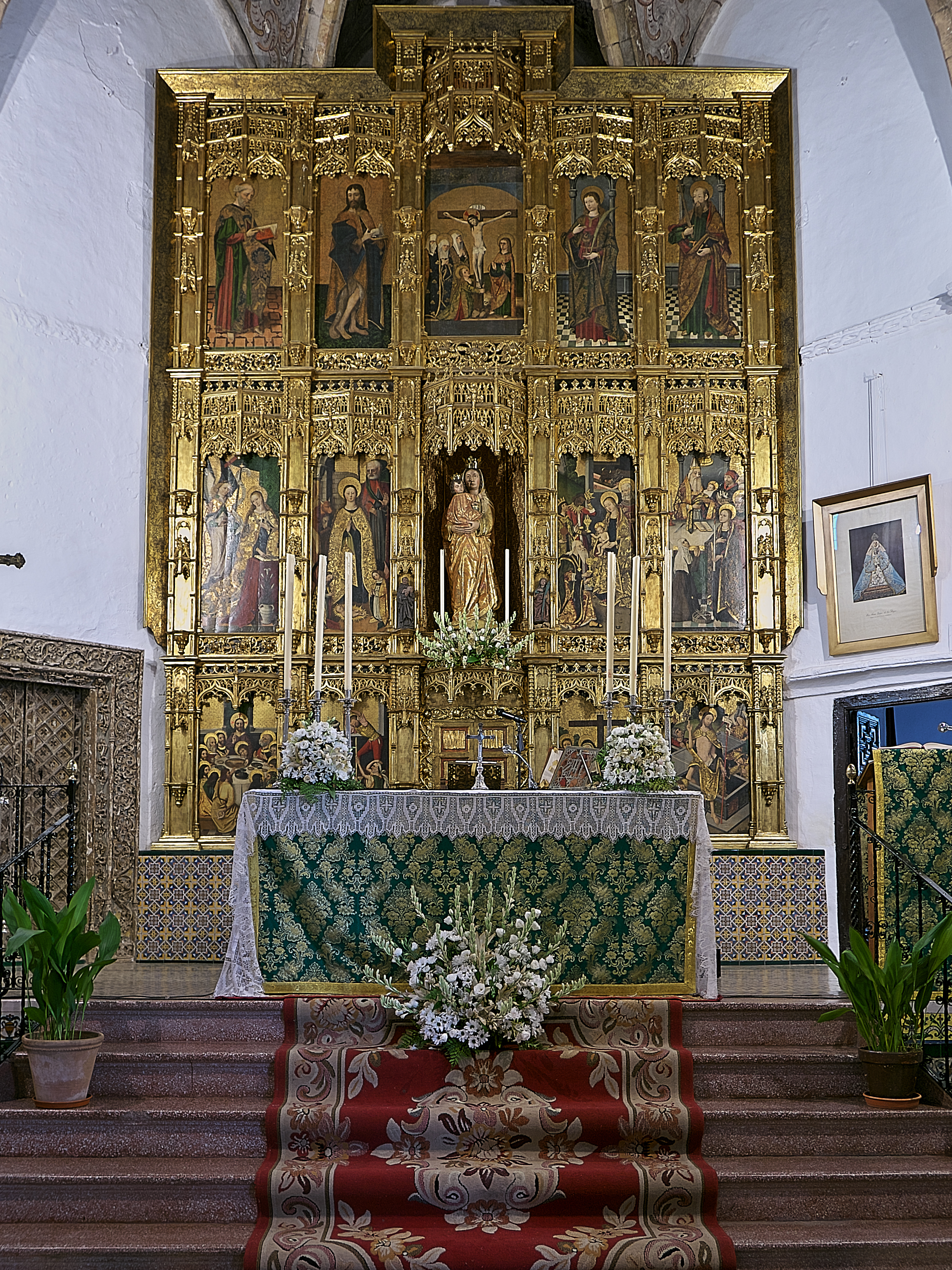 Soberbio retablo del gótico final en la provincia de Sevilla, finales del siglo XV o entre 1500-1510, de autor y promotor desconocido. Atribuido al taller de Juan Sánchez de Castro. Su planta es plana con pinturas sobre tabla y escultura de bulto en la calle central. Dañado por los sucesos de 1936 e importante restauración en 1971.